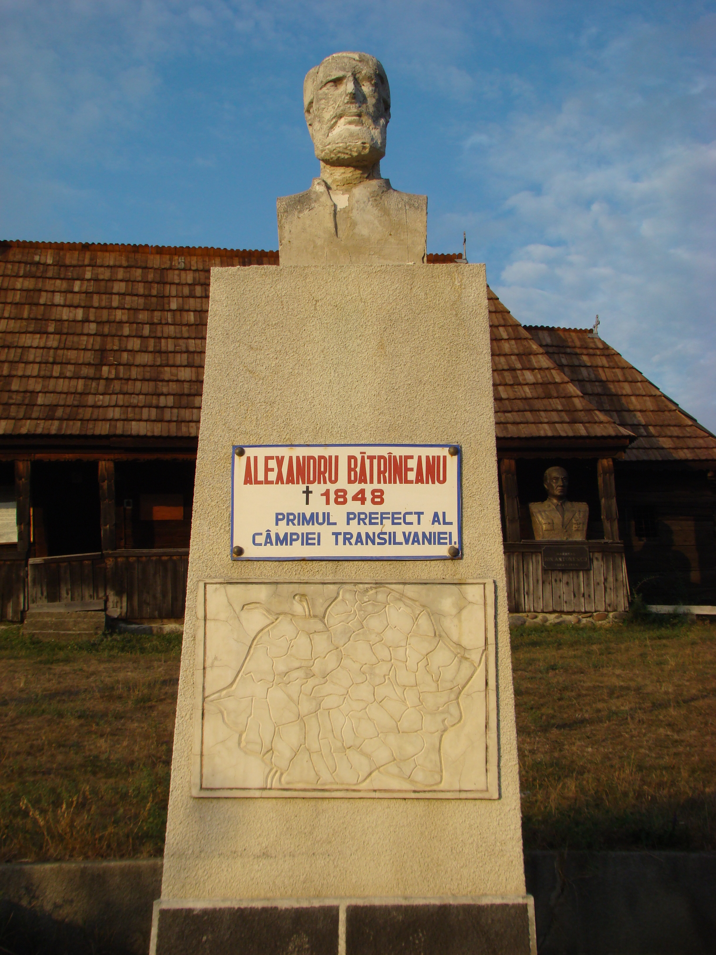 Biserica de lemn „Sf.Arhangheli” din Sărmașu, județul Mureș